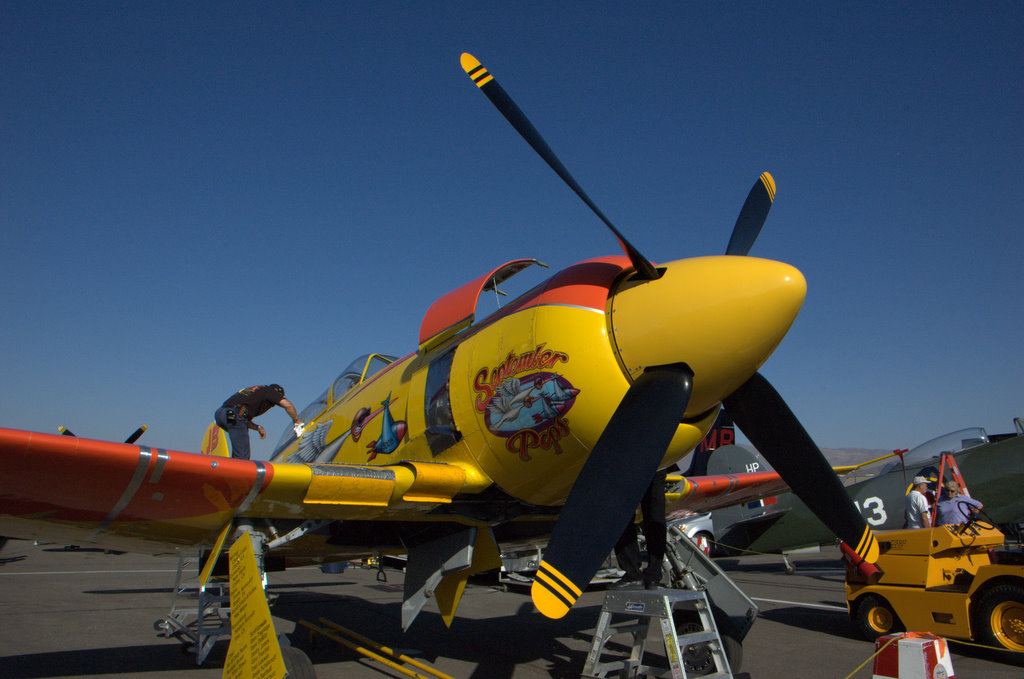 Reno Air Races 2008